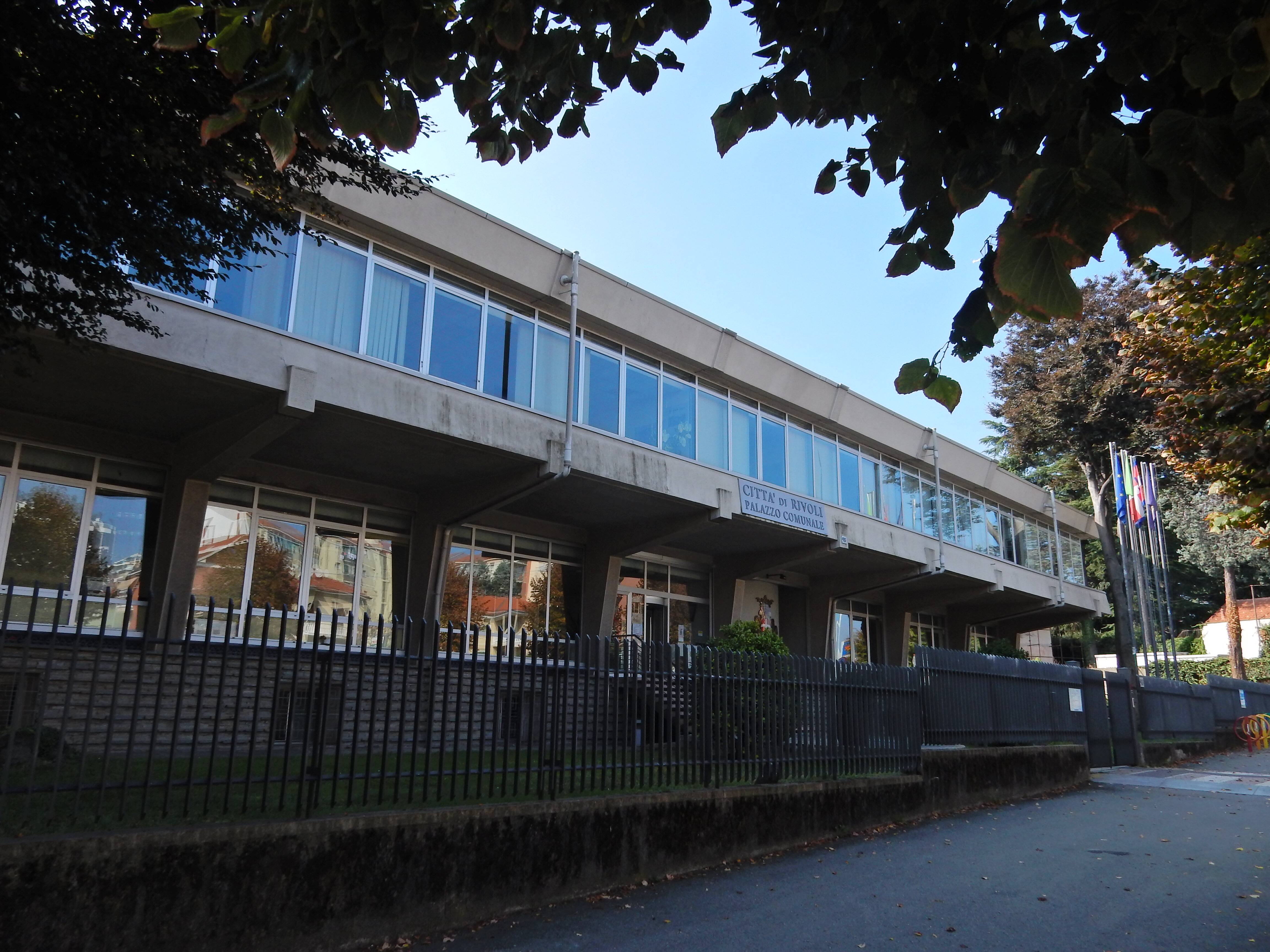 Edificio Comune di Rivoli